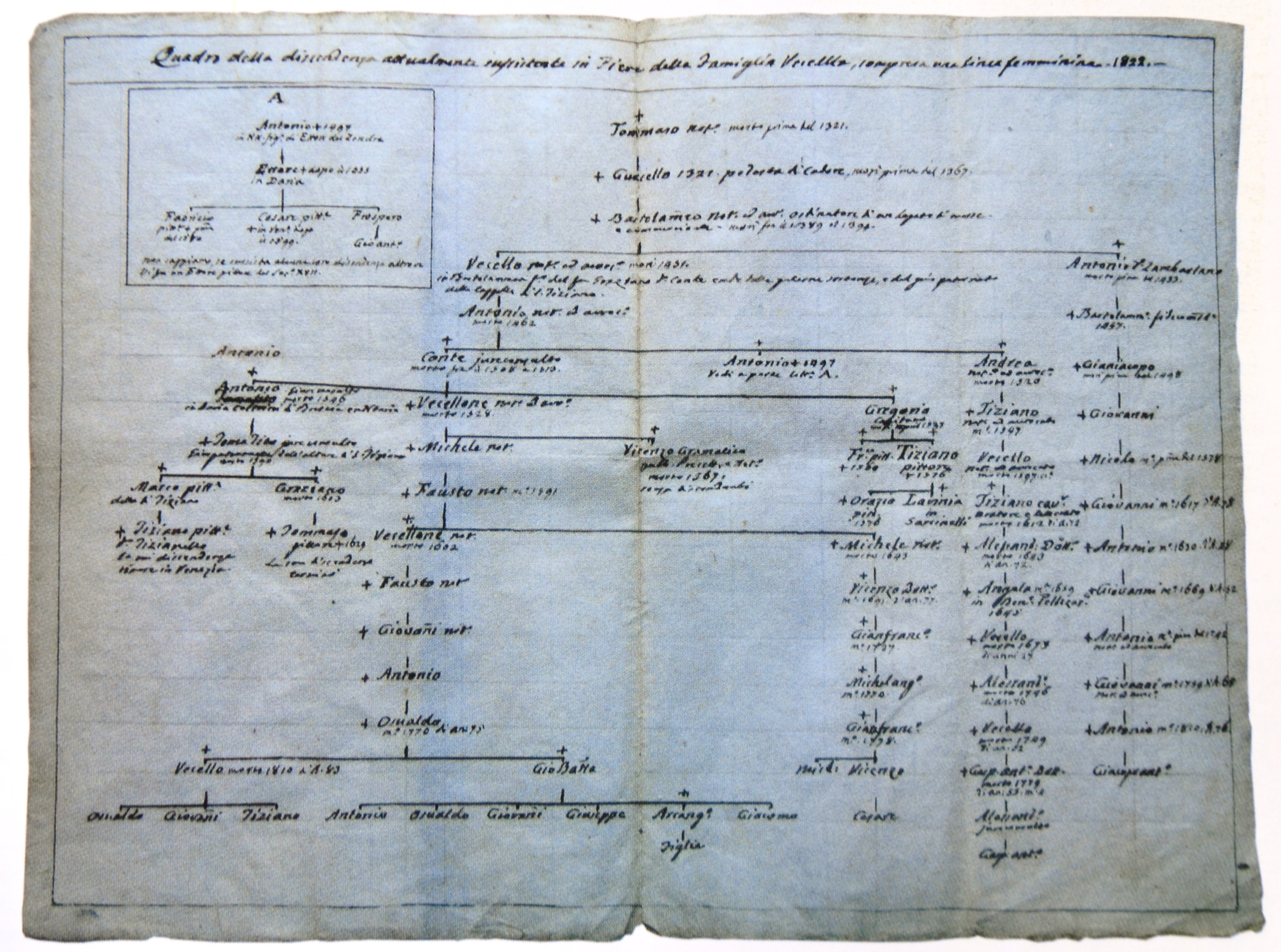 Quadro della discendenza attuamente insistente in Pieve della Famiglia Vecellio, compresa una linea femmininea